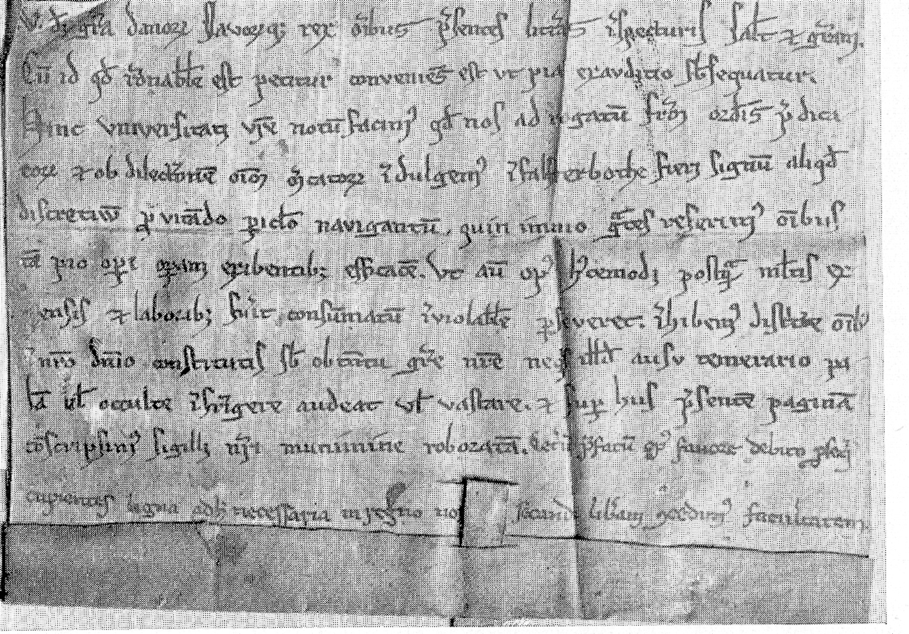 Privileg von 1220 ausgestellt von König Waldemar II. an die Stadt Lübeck mit der Ermächtigung auf der Halbinsel Falsterbo in Schonen ein hölzernes Seezeichen unterhalten zu dürfen und das für den Unterhalt benötigte Holz dort einzuschlagen. Original im Archiv der Hansestadt Lübeck.